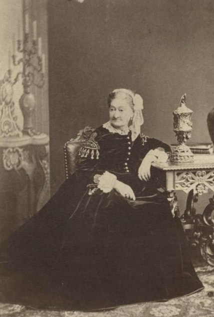 Евдокия Владимировна Сухозанет, ур. Яшвиль (1801—1895)